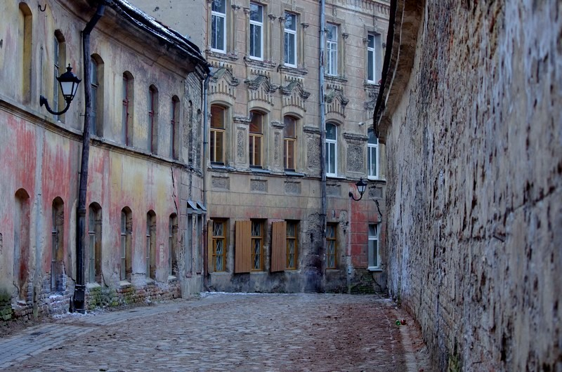 Šventosios Dvasios gatvė Vilniuje